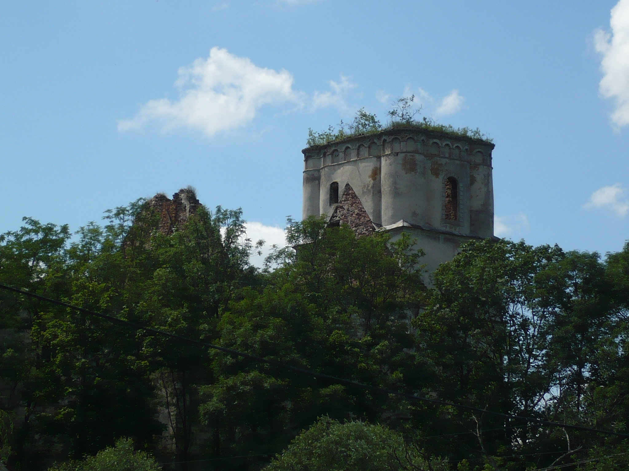 Jazłowiec. Kościół (Костел Успіння Пресвятої Діви Марії, Язловець)